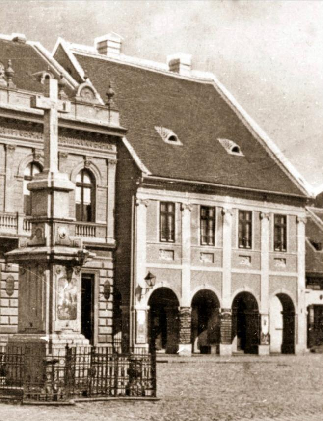 Место на коме је Миливој Каракашевић отворио своју прву књижару